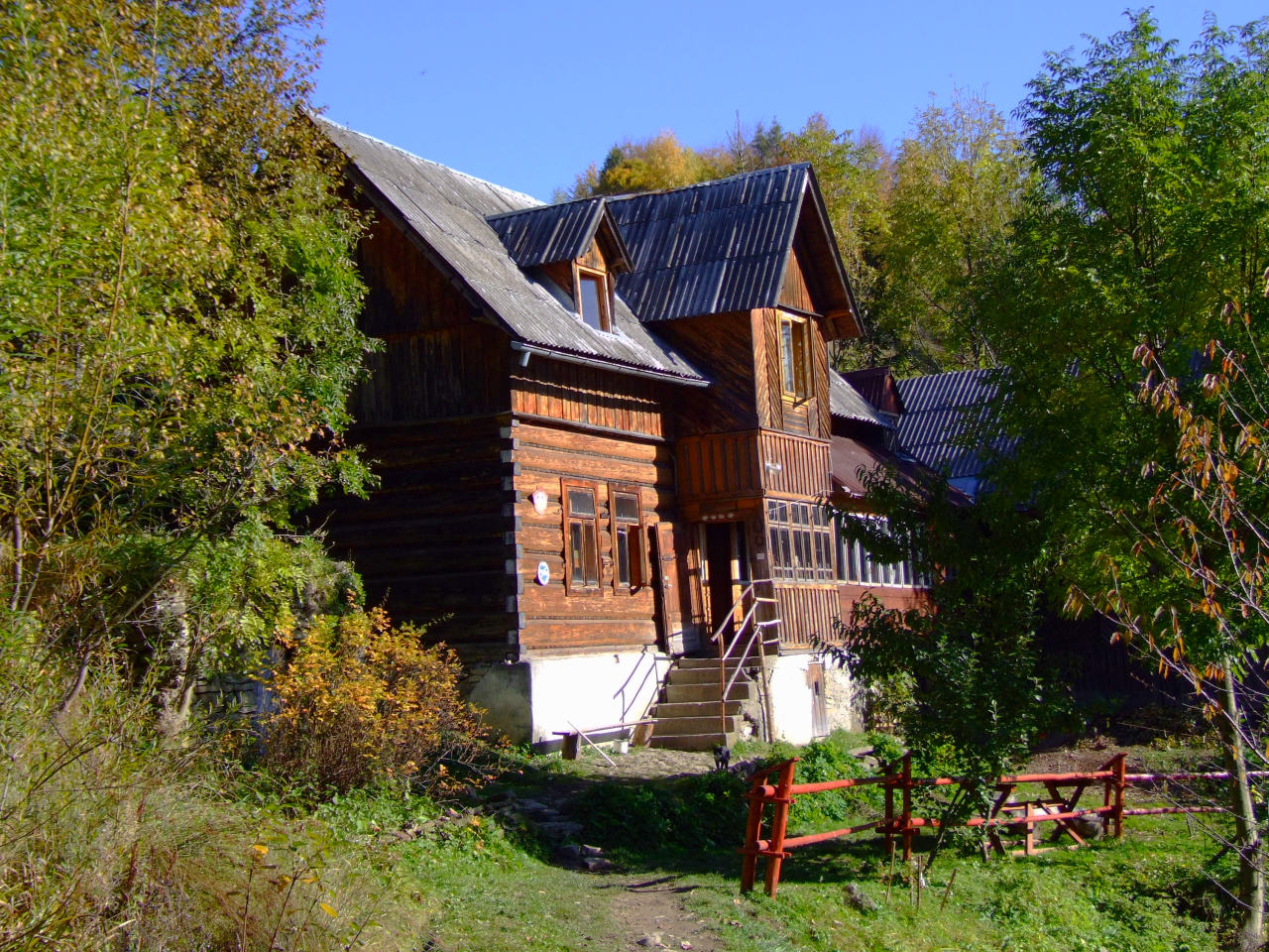 schronisko "Hawiarska Koliba"